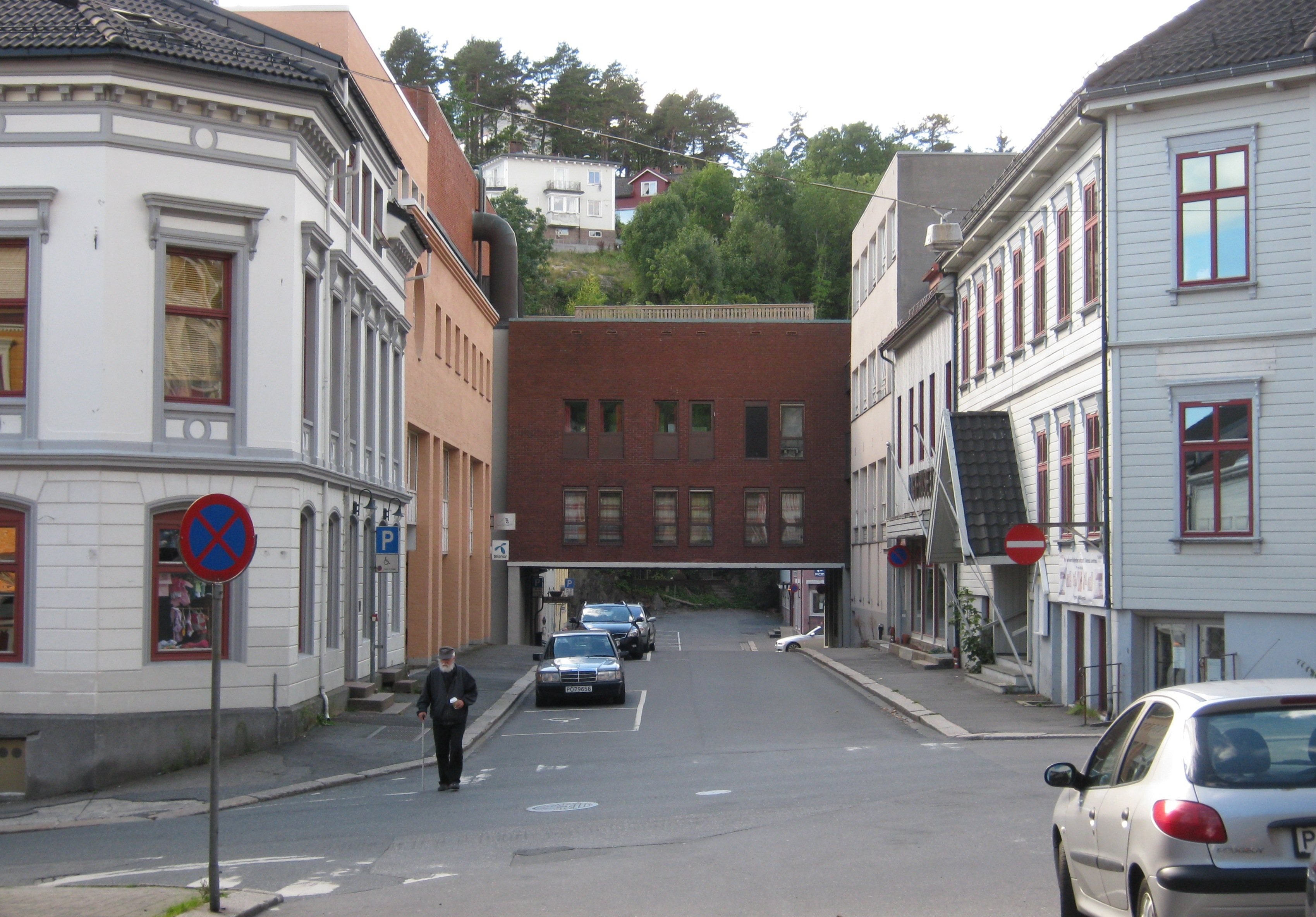 Nygaten i Arendal